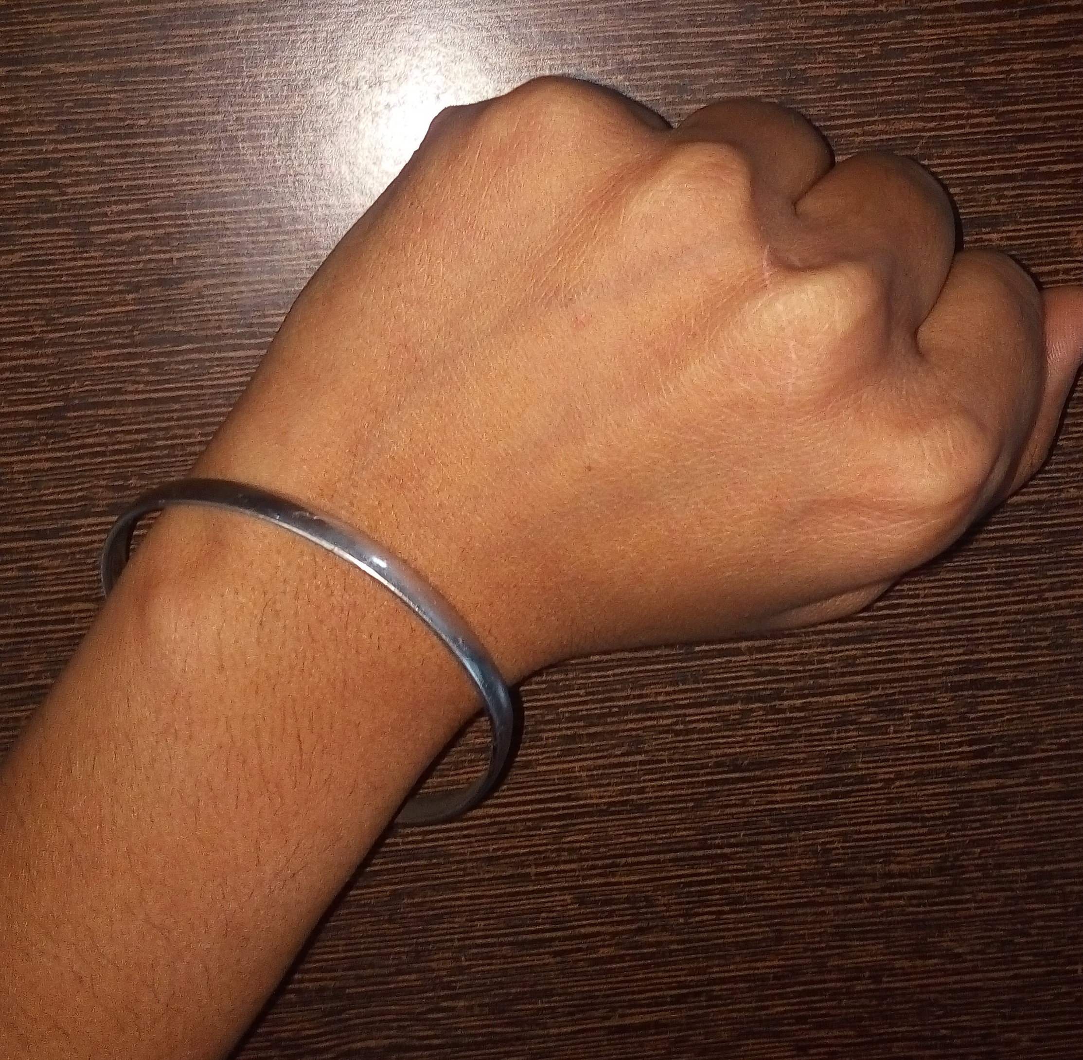 हातातील कडा